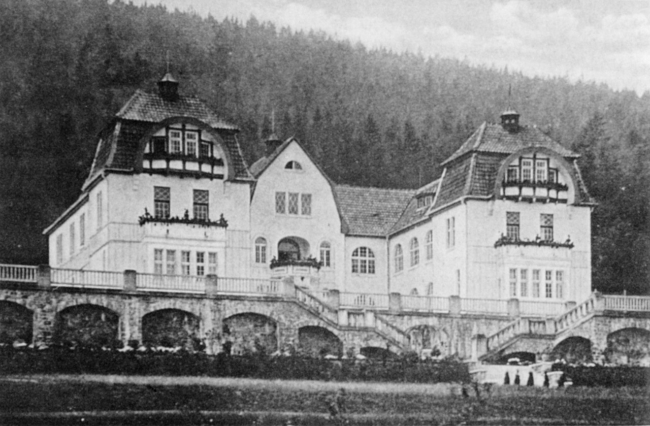 Das ehemalige Sanatorium Grotenburg in Detmold/Hiddesen